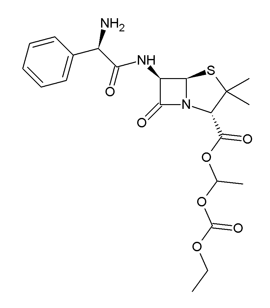 Bacampicillin